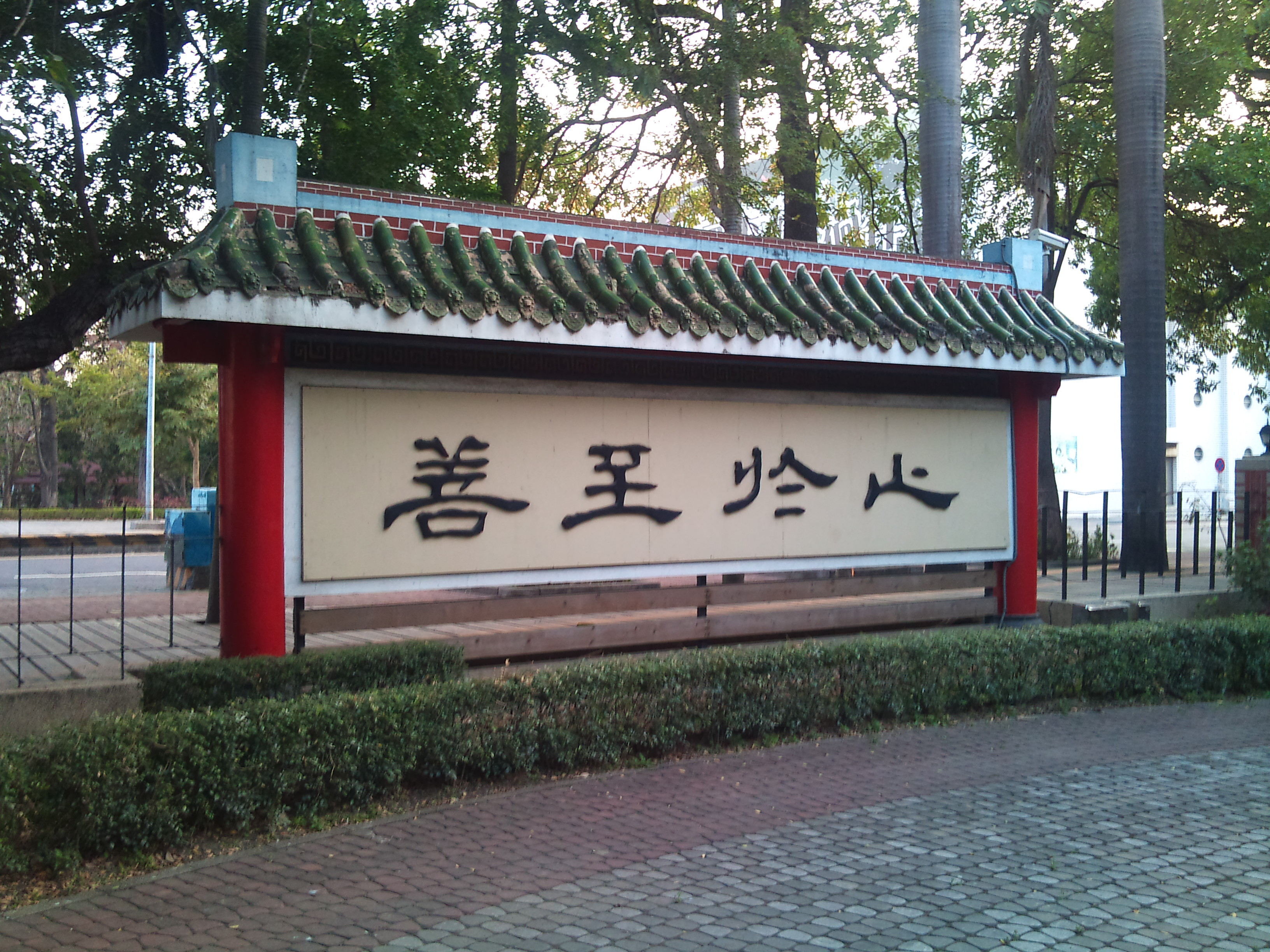 國立台南第二高級中學校訓 - 止於至善